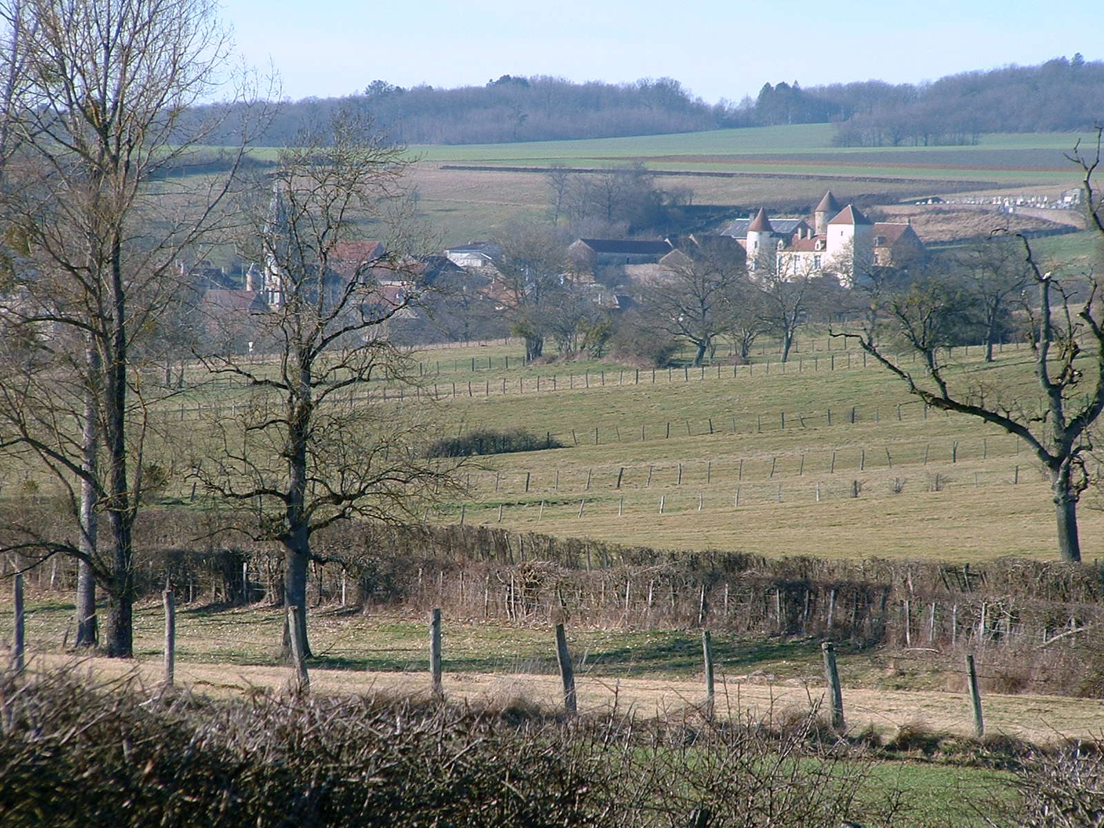 Thory (Yonne) : vue générale